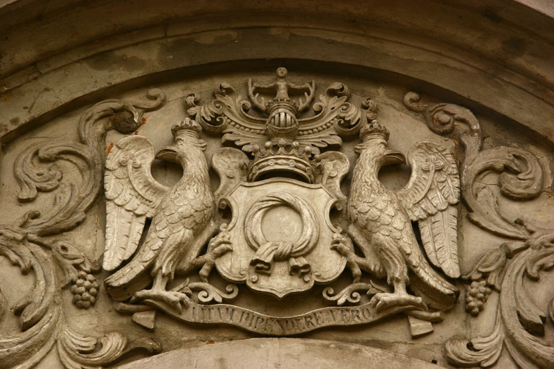 Nałęcz coat of arms of Raczyński comital family.